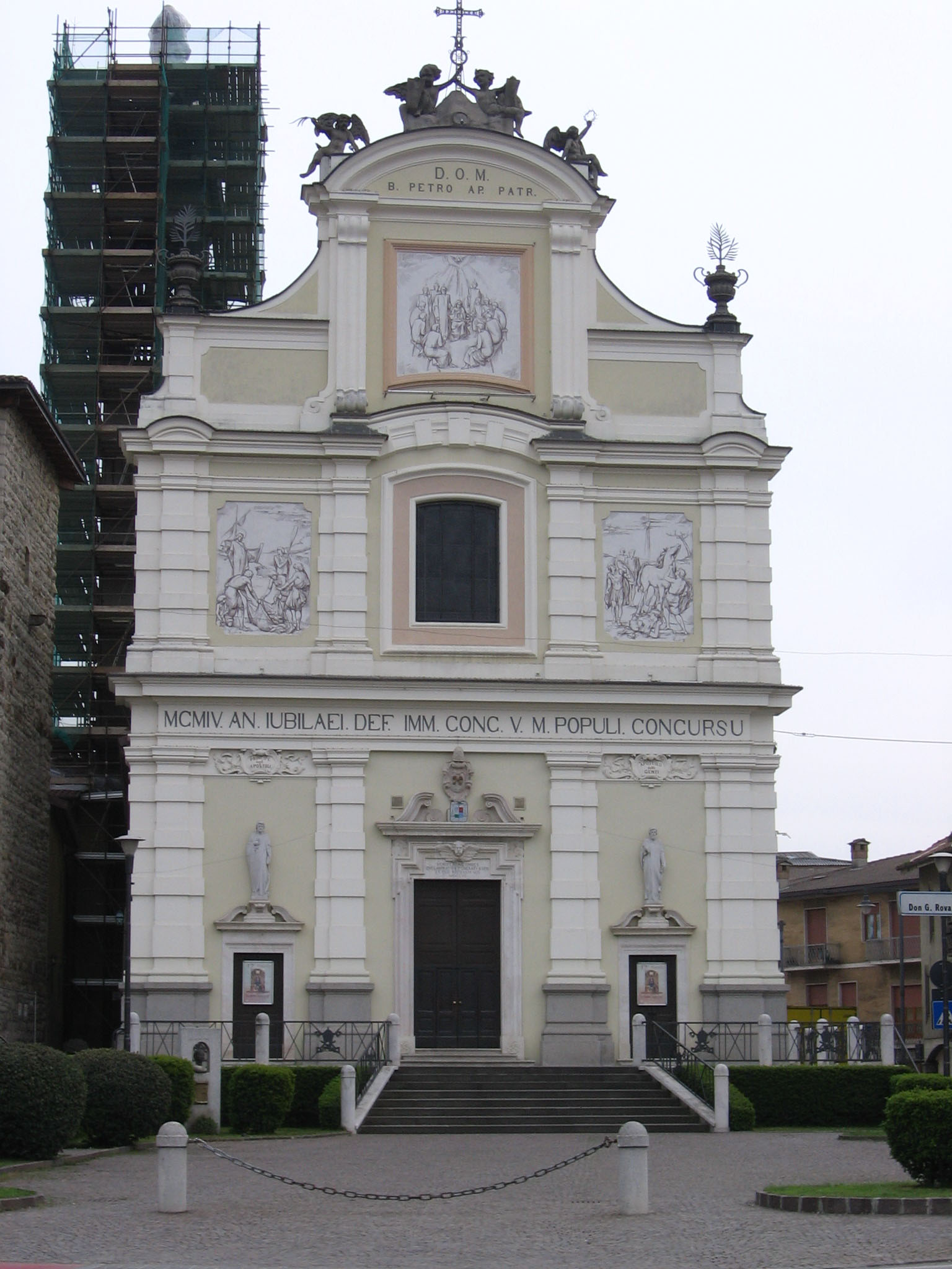 Bolgare, Bergamo, Italia